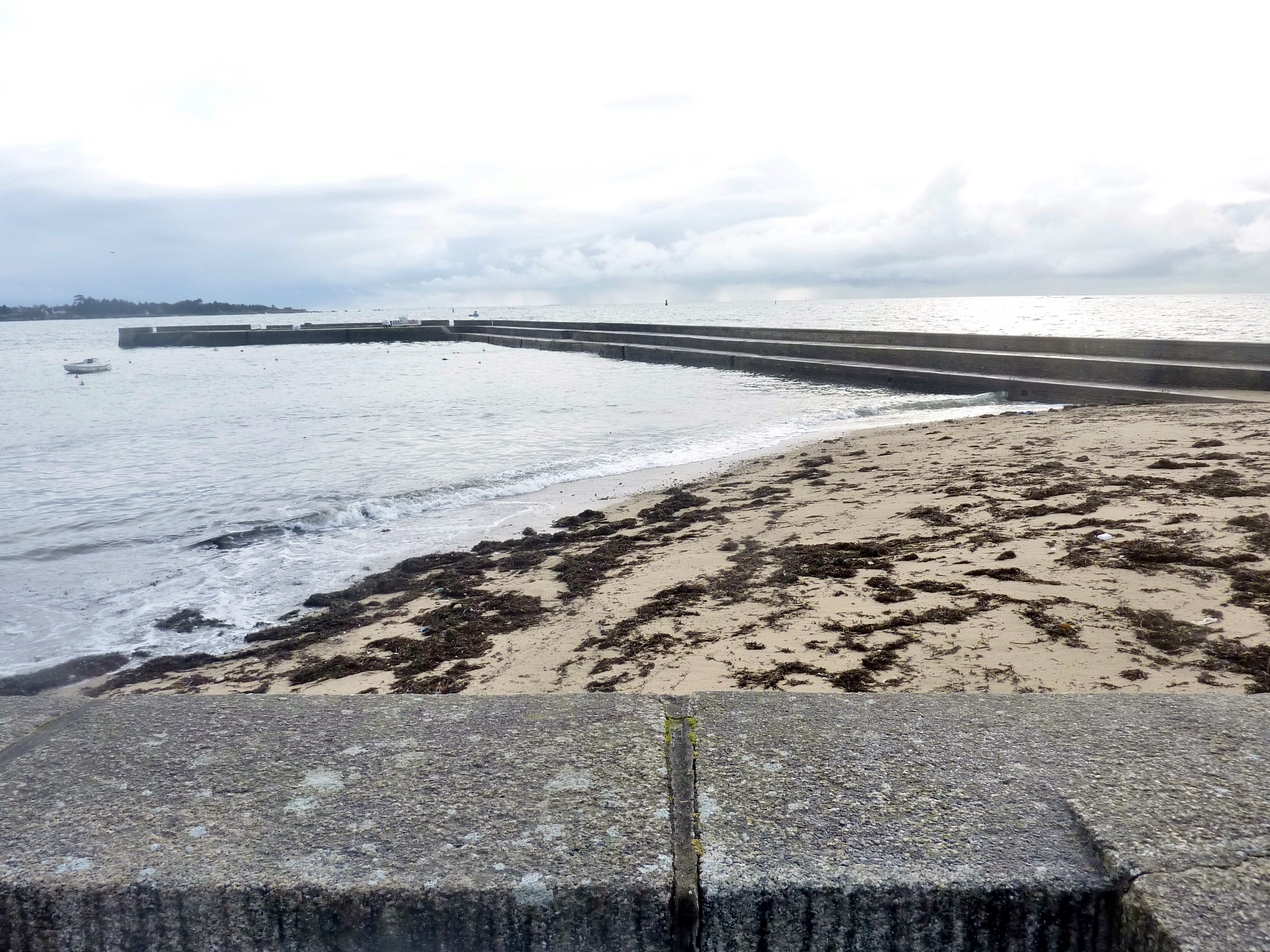 Concarneau : le "quai Nul", surnommé ainsi par les Concarnois car il n'offrait qu'une protection peu efficace aux bateaux par gros temps. Construit entre 1882 et 1901.